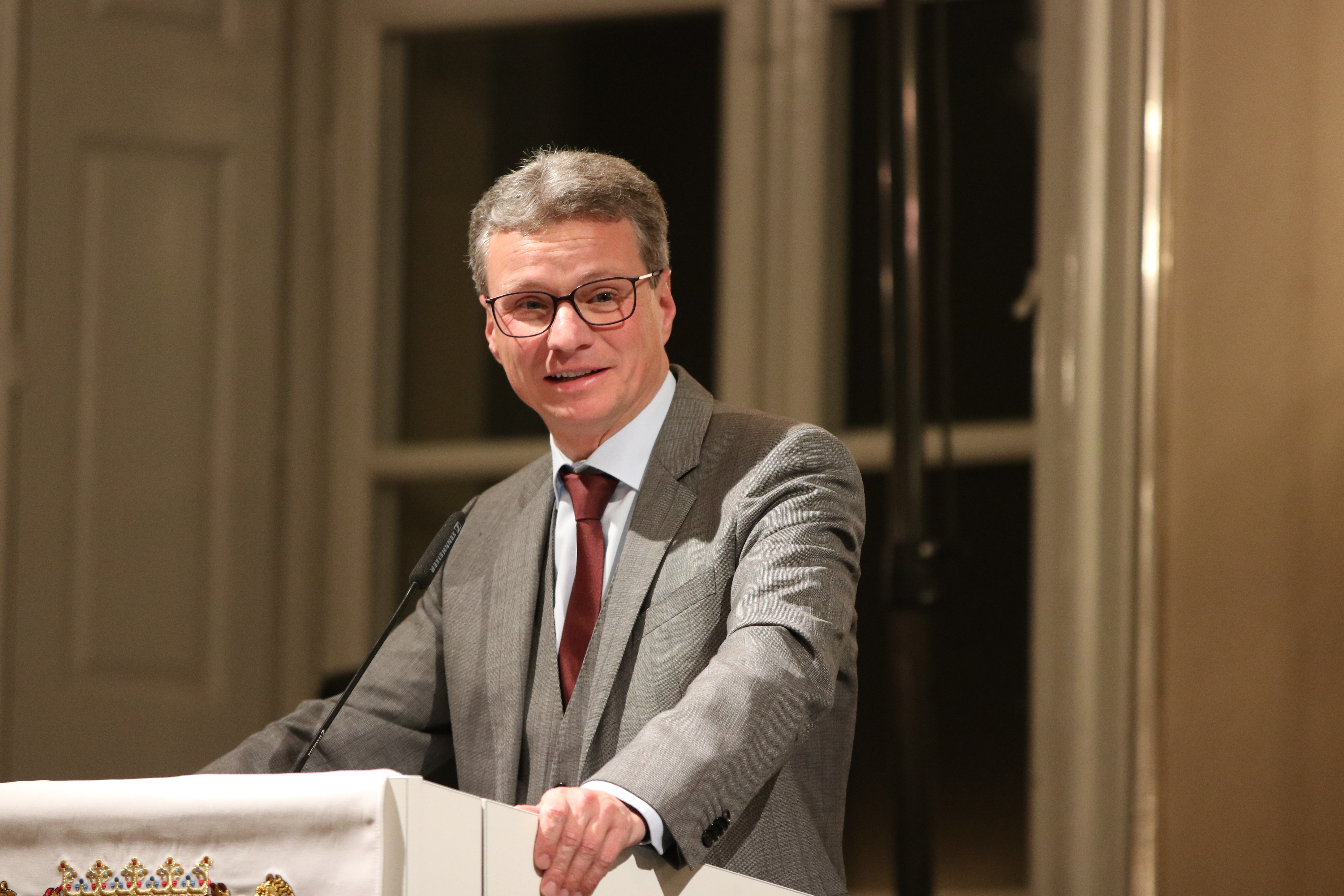 Der bayerische Staatsminister für Wissenschaft und Kunst Bernd Sibler hält die Ansprache Jean-Paul-Preis 2019 an Ursula Krechel im Hubertussaal in Schloss Nymphenburg in München